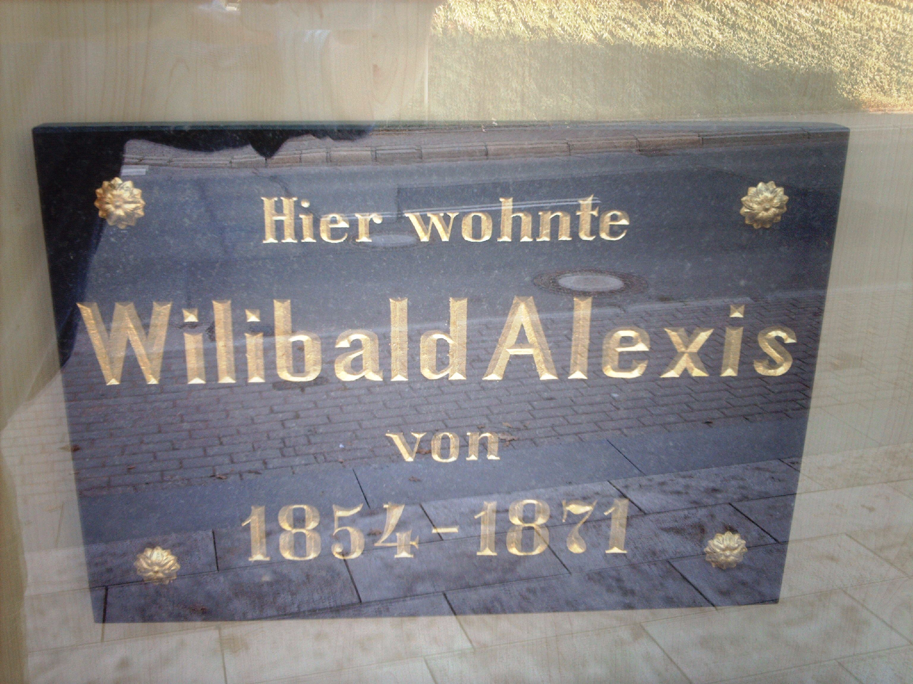 Erinnerungstafel an das ehemalige Wohnhaus von Willibald Alexis in Arnstadt (Lindeneck, Lindenallee).